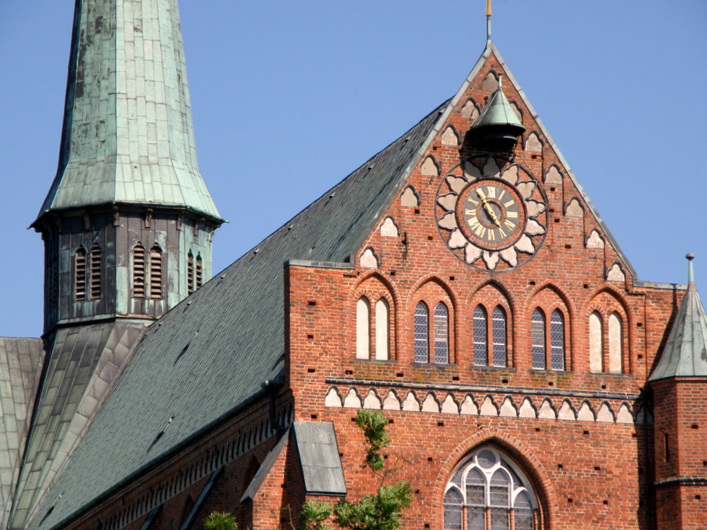 Detailbild, Westgibel des Doberaner Münsters